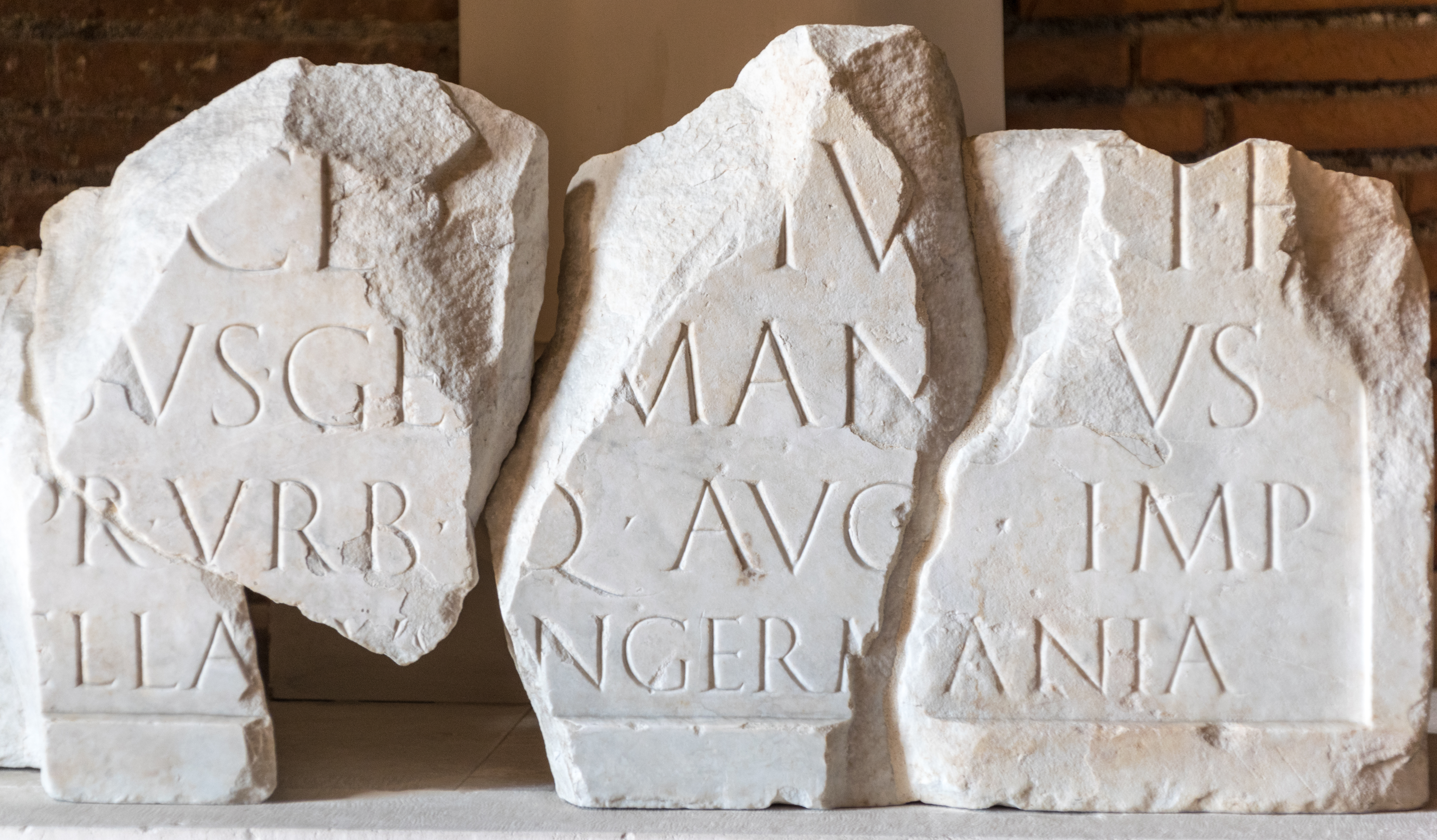 Fragmente einer Ehreninschrift des Nero Claudius Drusus, die zu einer Statuenbasis aus Marmor gehörten (CIL VI 40330 = AE 1934, 151 = AE 1938, 4 = AE 1938, 124 = AE 1985, 42 = AE 1987, 65c = InscrIt 13-3, 9 = AE 1997, 181). Die Statue war um das Jahr 2 v. Chr. in einer Wandnische im Portikus des Augustusforums aufgestellt. [Nero] Cl[a]udiu[s] Ti(beri) f(ilius) / [Dru]sus German[i]cus / [co(n)s(ul)] pr(aetor) urb(anus) q(uaestor) aug(ur) imp(erator) / [app]ellatus in Germania